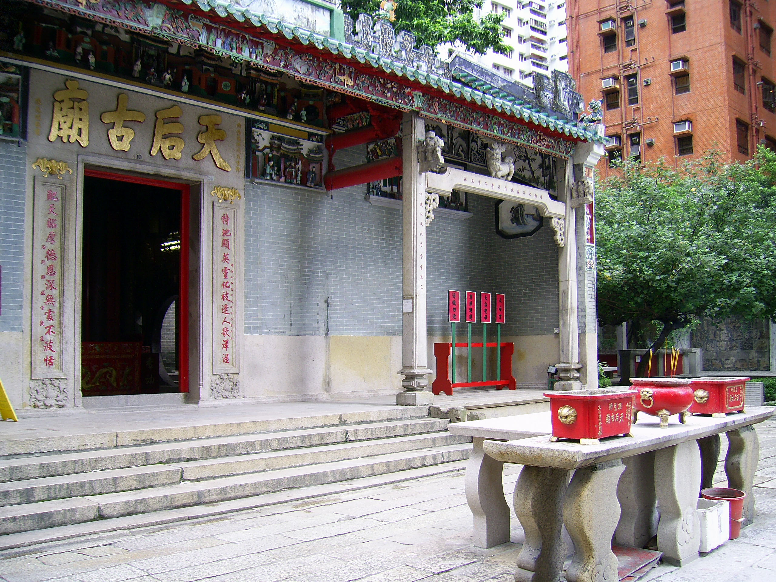 中文（香港）: 銅鑼灣天后廟